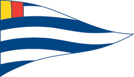 Pavillon de la Société Nautique de Genève